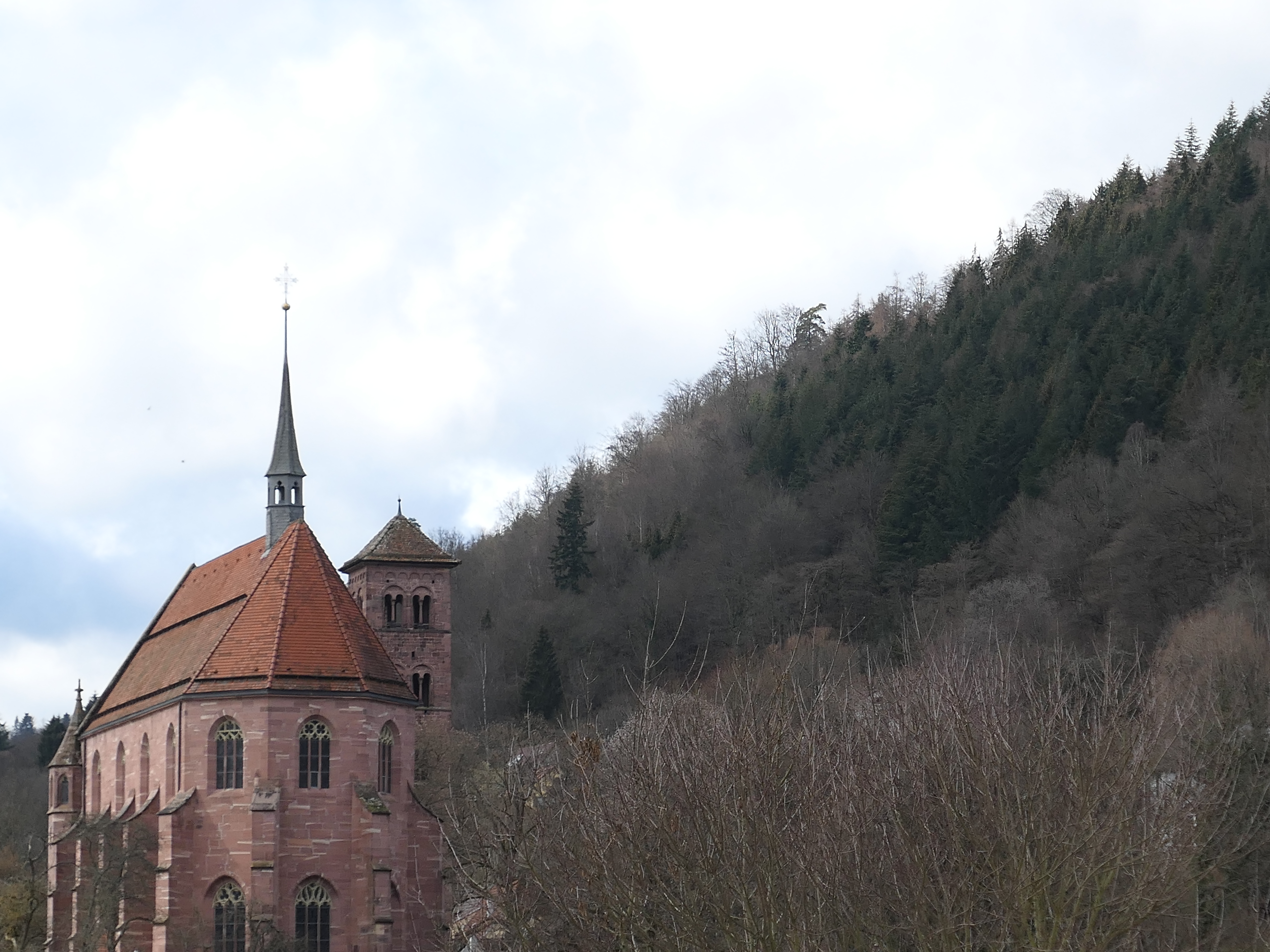 Hirsau Kloster Marienkapelle Ostansicht vor Eulenturm